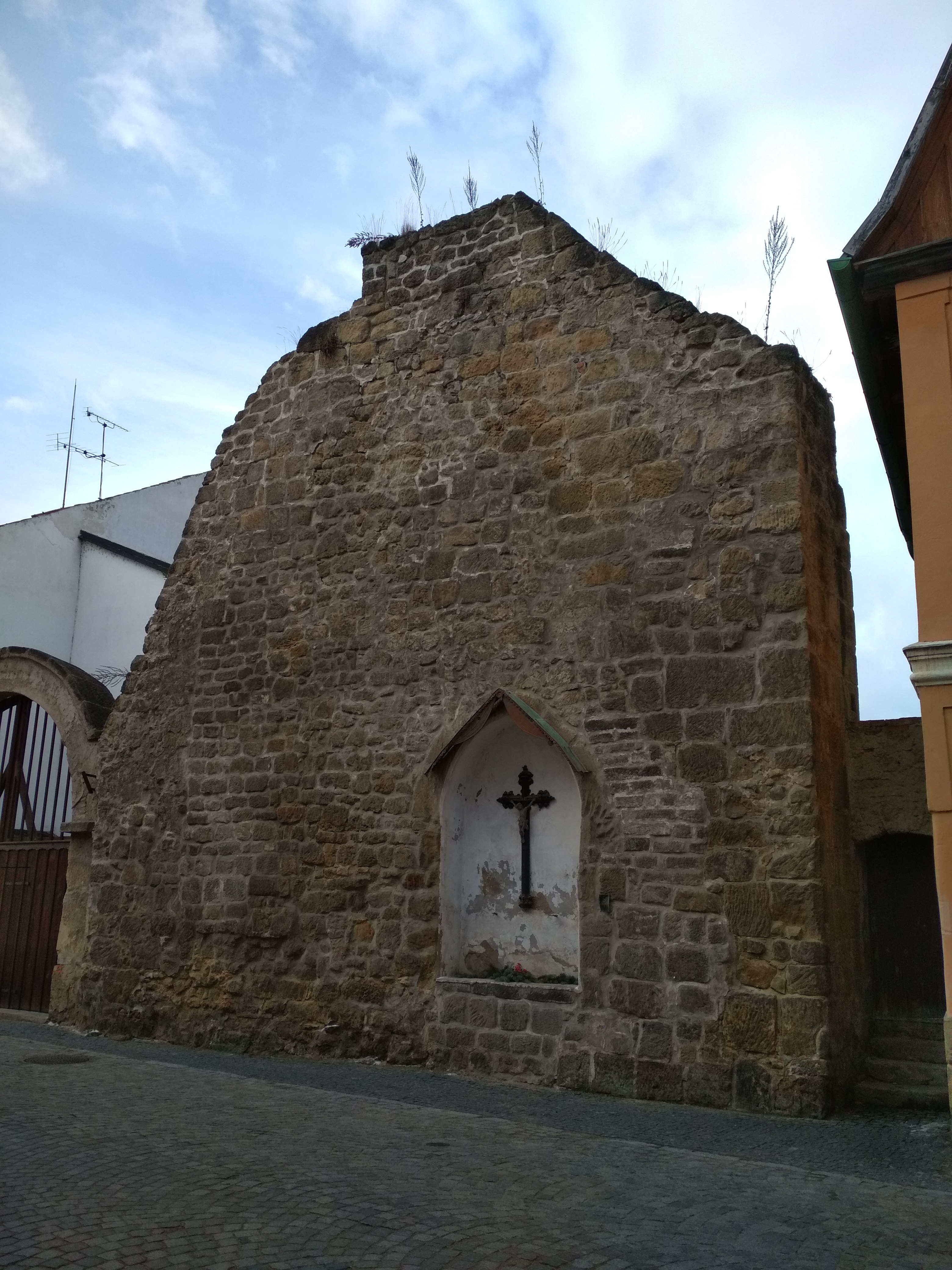 Západní brána v Úštěku, pohled od náměstí